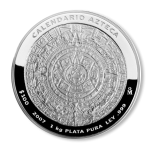 Esta es una imagen de la moneda conmemorativa de 1kg en plata del representativo calendario Azteca del año 2007